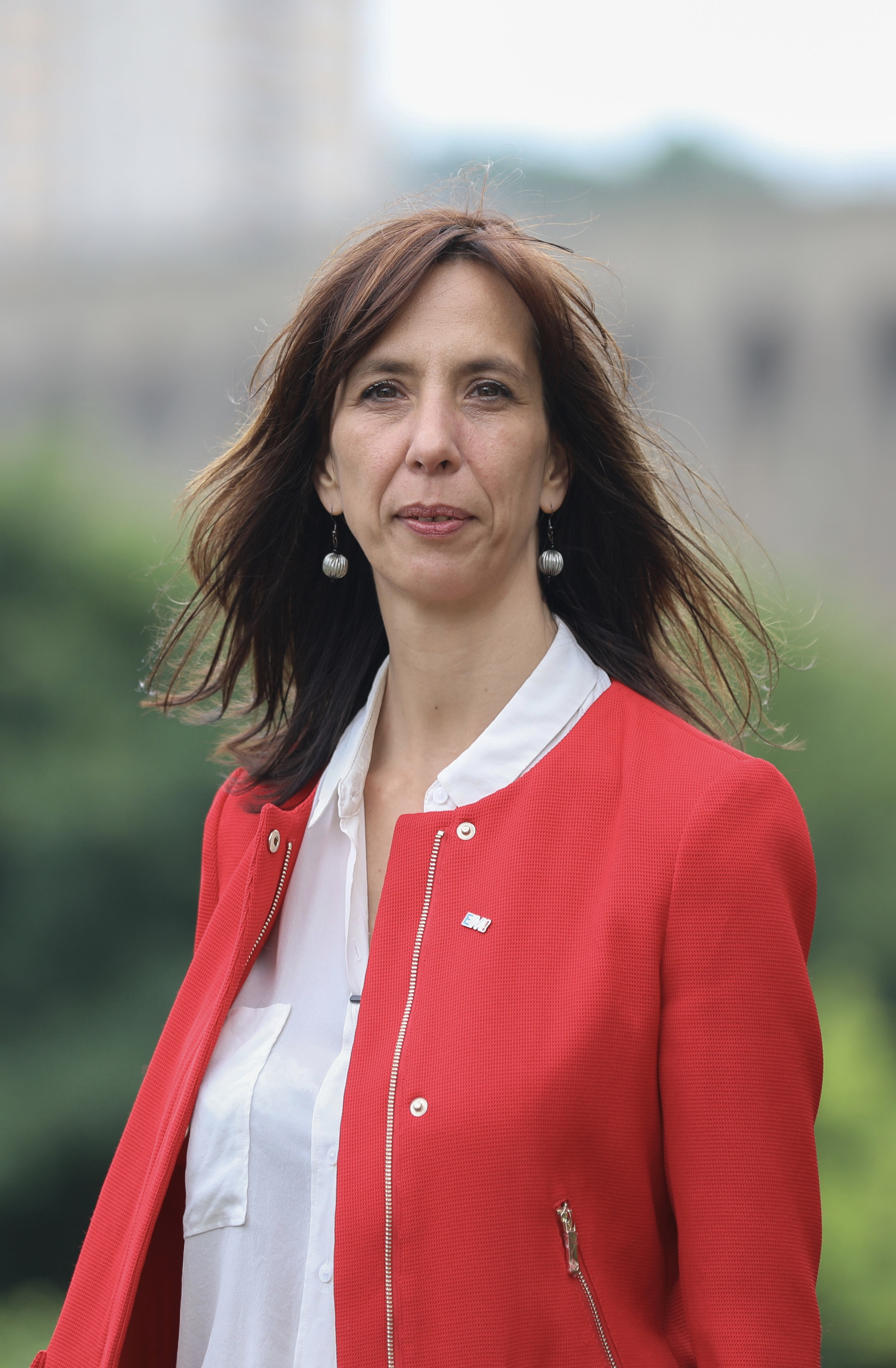 Albane gaillot (2) à Arcueil.